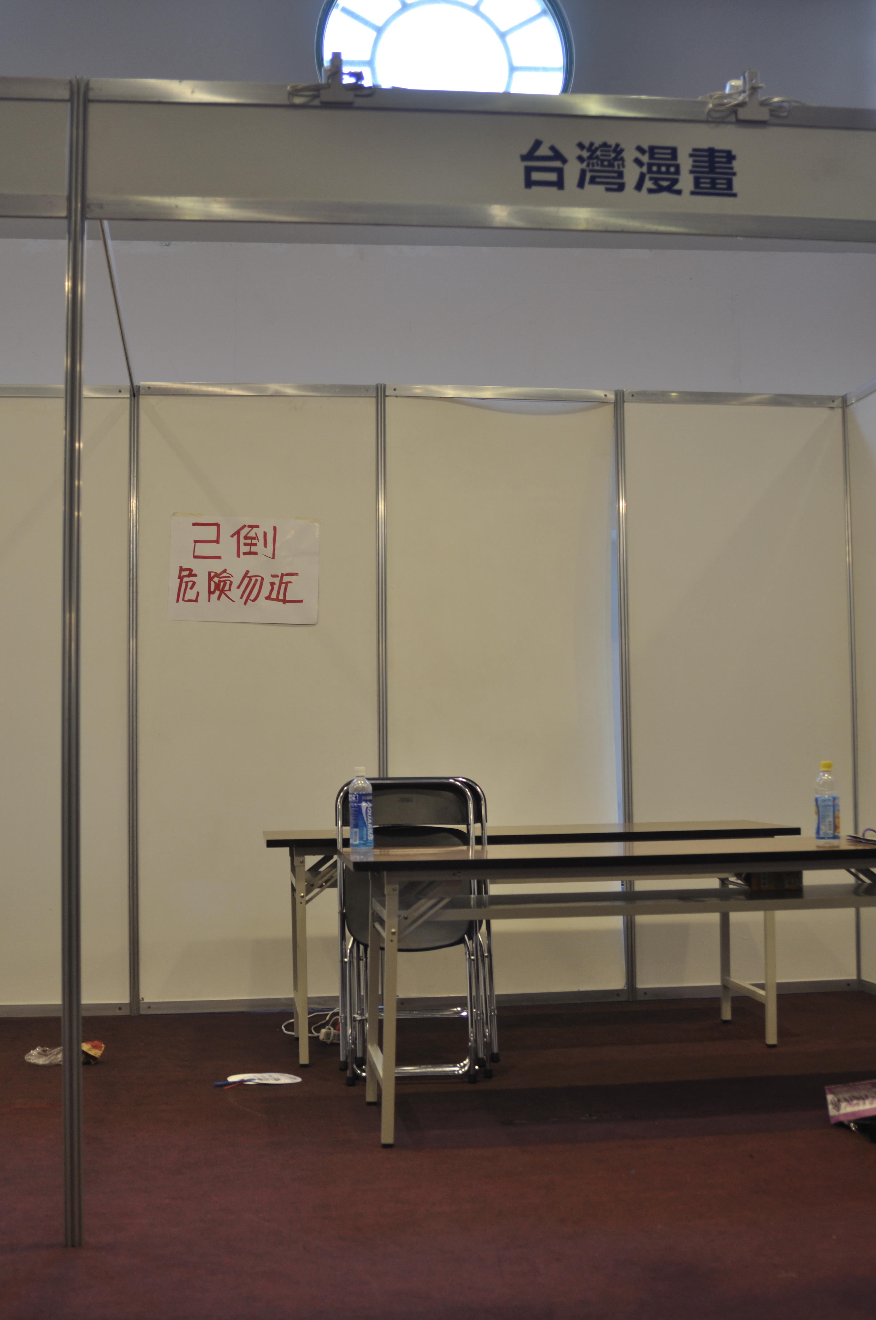 第18屆開拓動漫祭，《台灣漫畫月刊》發行商「台灣漫畫股份有限公司」攤位空無一人，左後方貼紙條「已倒，危險勿近」。